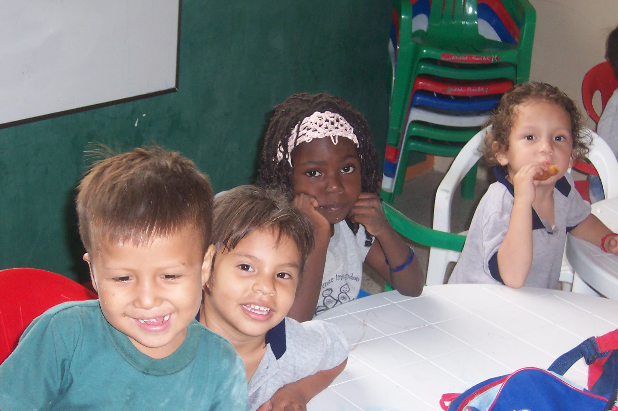 Programa ZUMAR: Niños en el Lardín integrado 2006